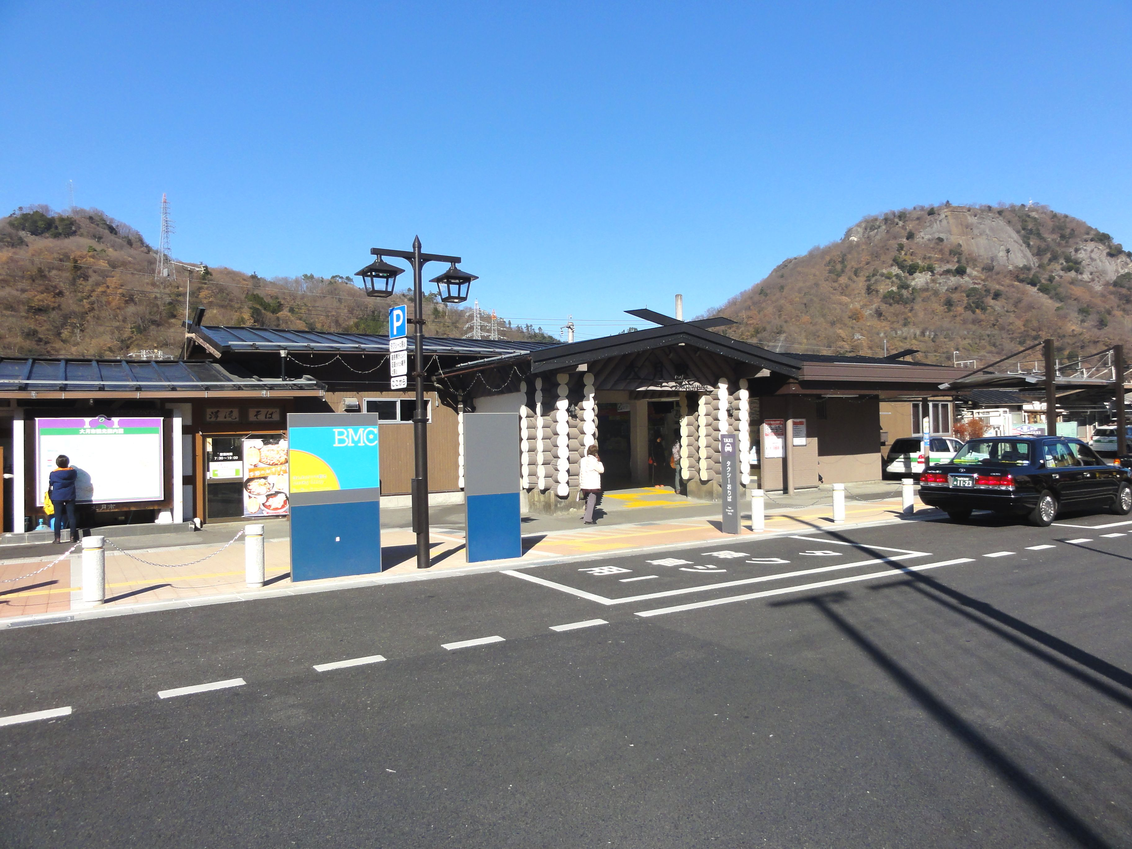 大月駅